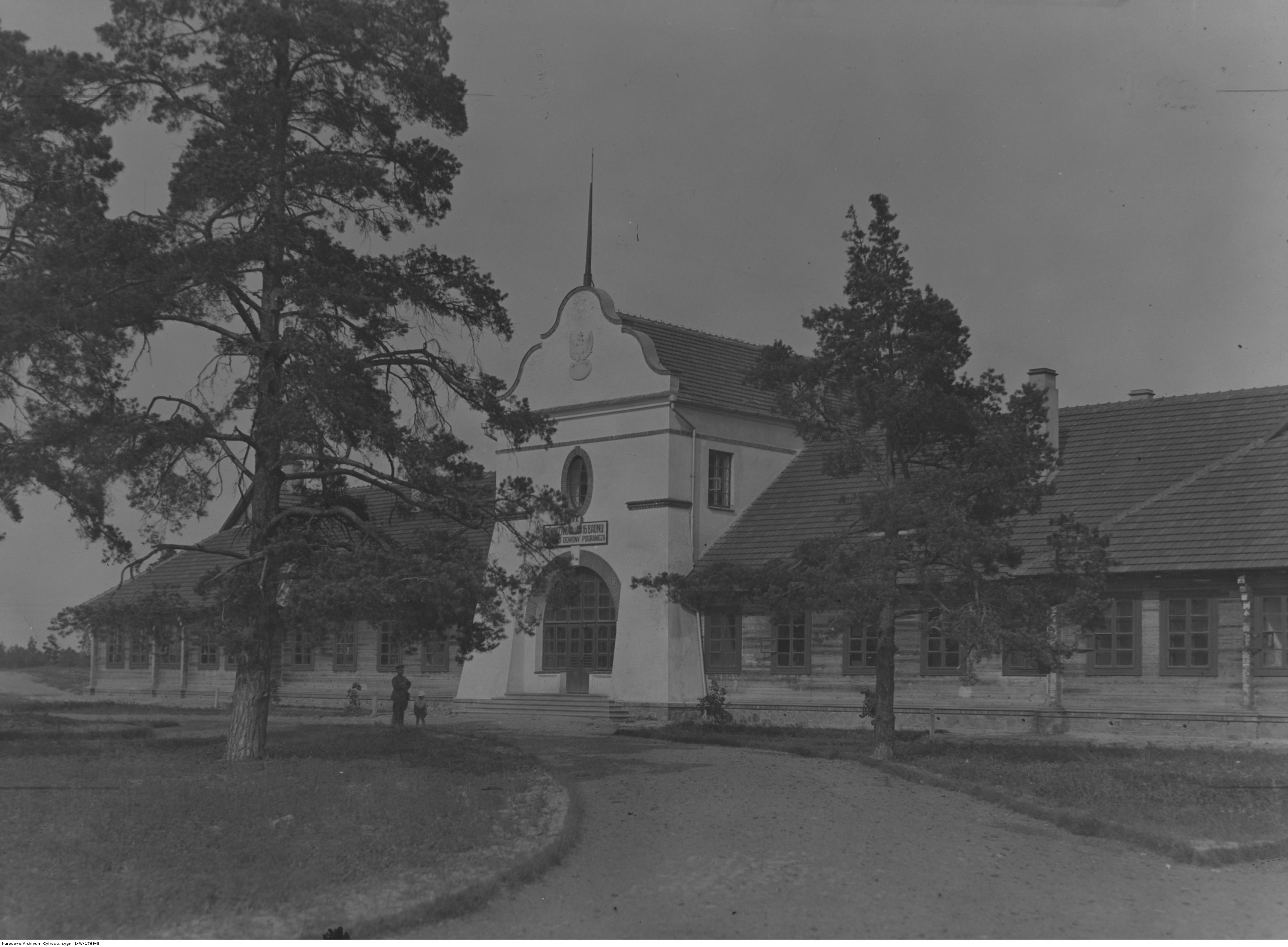 Koszary 16 Batalionu Granicznego Korpusu Ochrony Pogranicza w Sienkiewiczach, na granicy polsko-radzieckiej. Koncern Ilustrowany Kurier Codzienny - Archiwum Ilustracji. Sygnatura: 1-W-1769-8